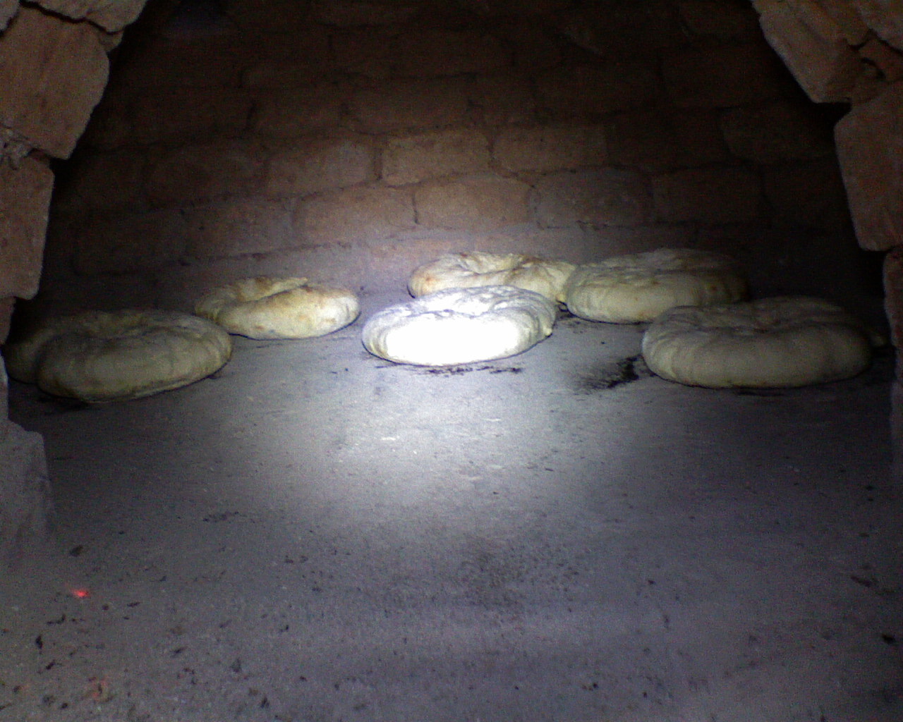 Почење лепиња у фурини облика полулопте.